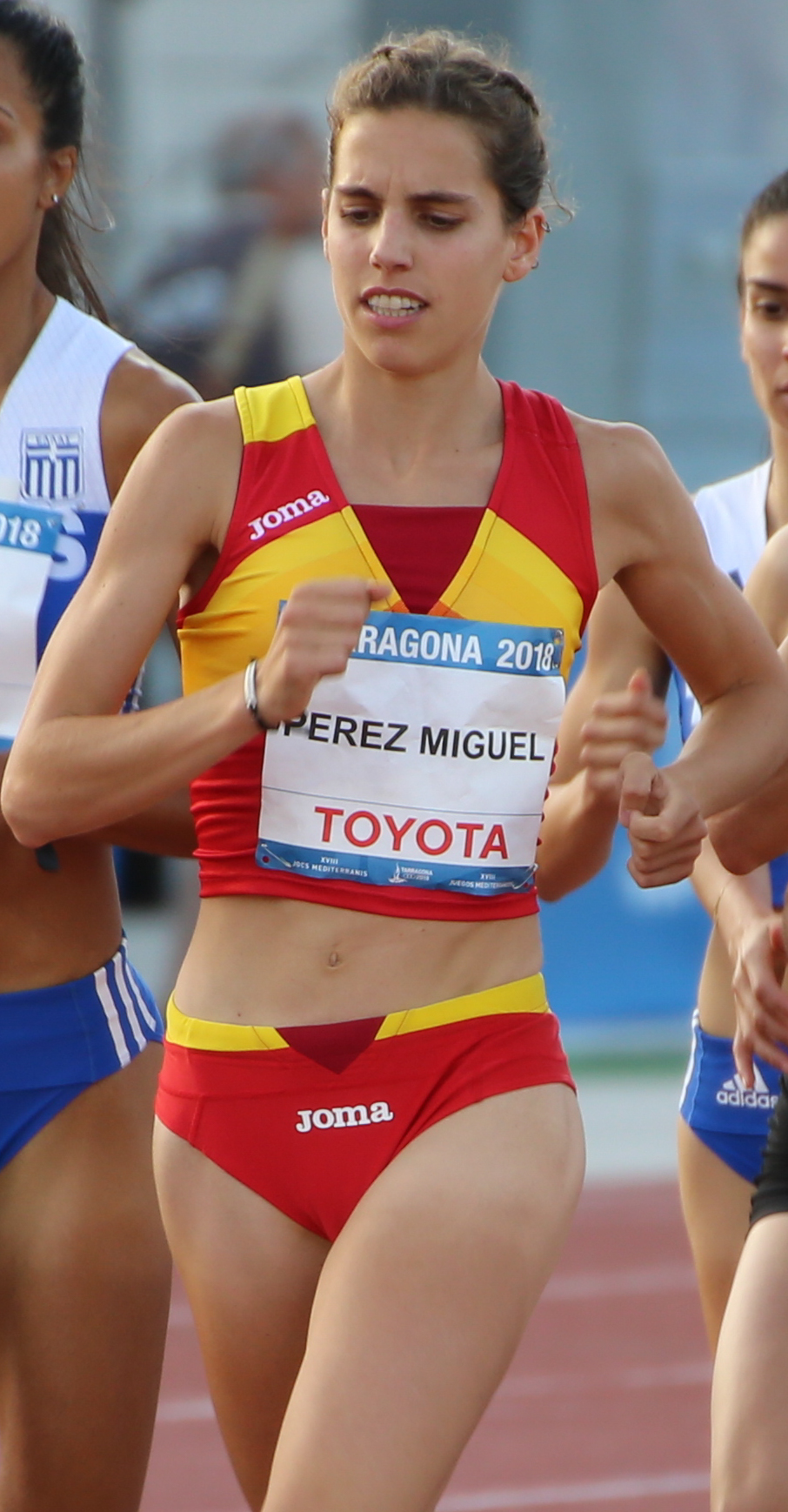 1500 metros en los Juegos del Mediterráneo 2018